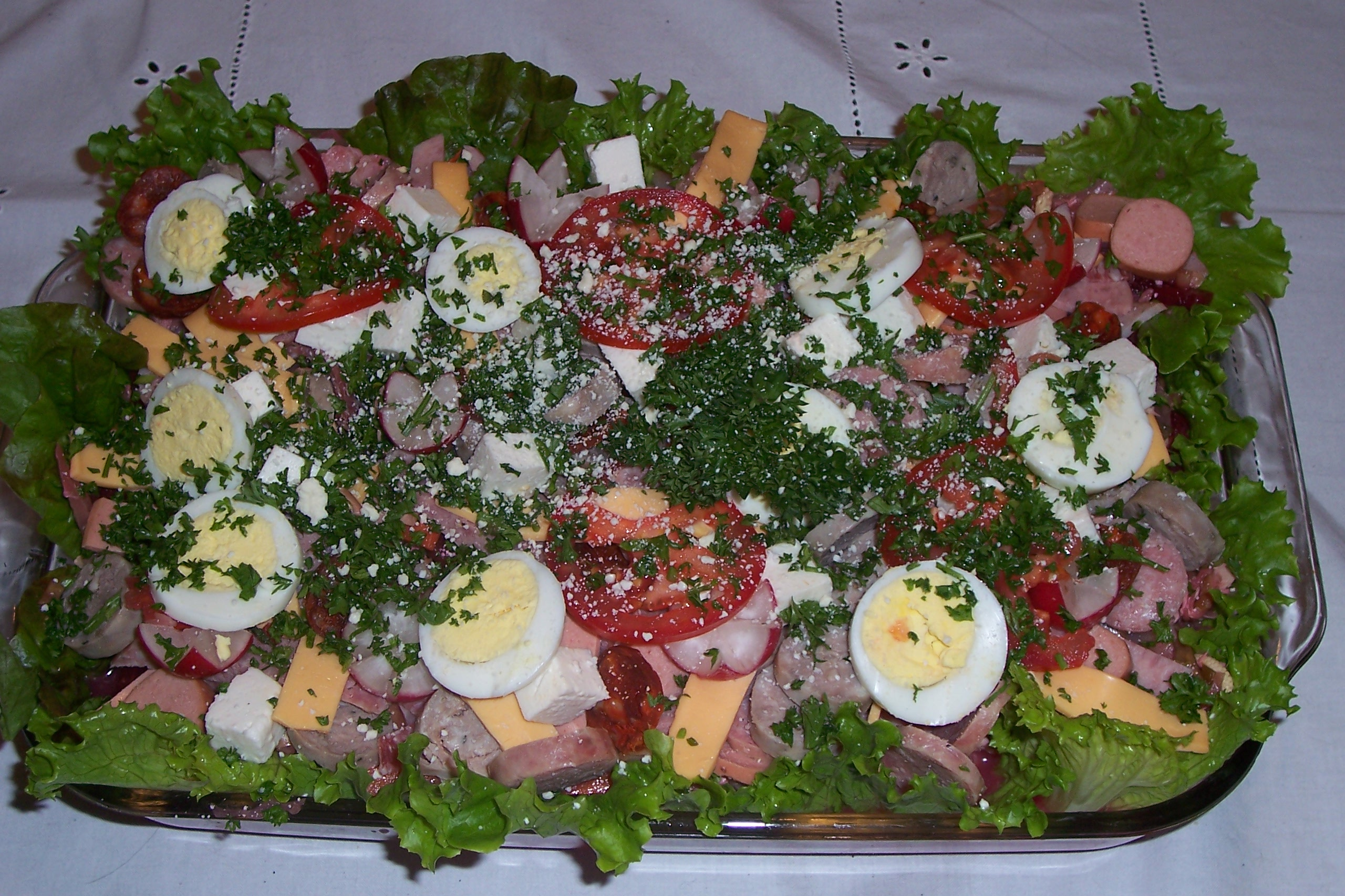 Fiambre, plato tipico guatemalteco.